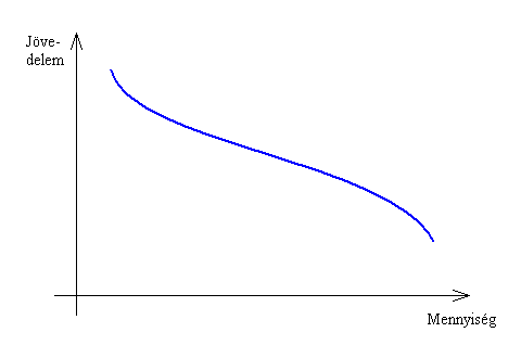 Inferior jószág (illusztráció a Fogyasztáselmélet (mikroökonómia) cikkhez)